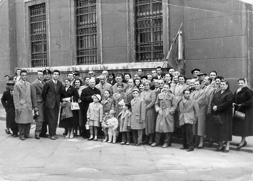 1959 Trieste: Comunità di Piemonte d'Istria